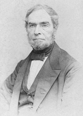 Isaäc Antoni Soetens van Roijen (1800-1868)